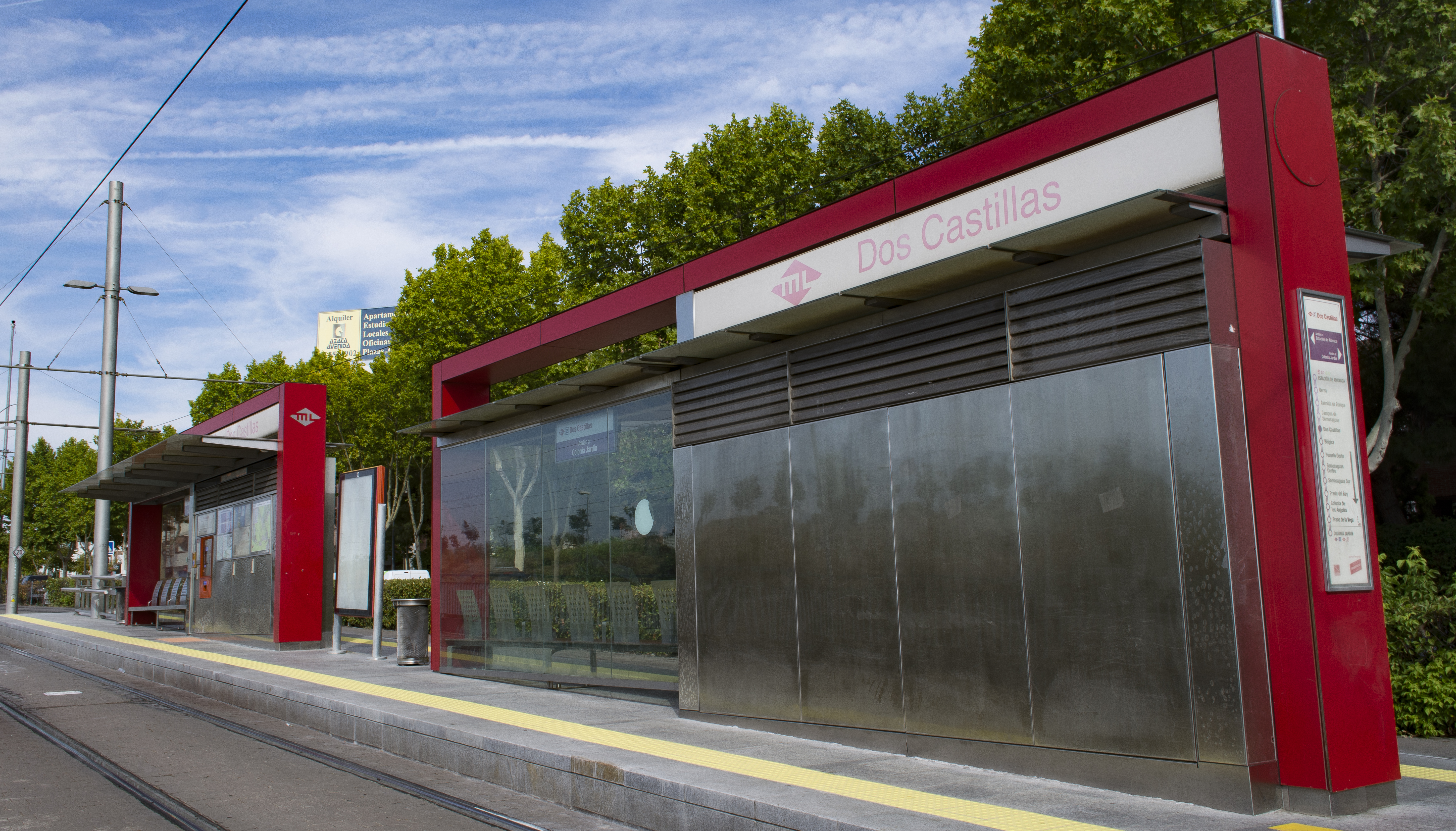 Marquesinas situadas cerca de la confluencia de la Vía Dos Castillas, que da nombre a la estación, con la Carretera de Húmera.